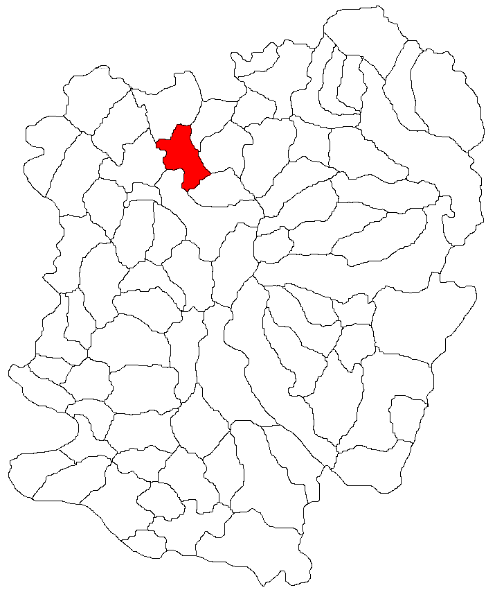 Categorie:Hărţi ale judeţului Caraş-Severin